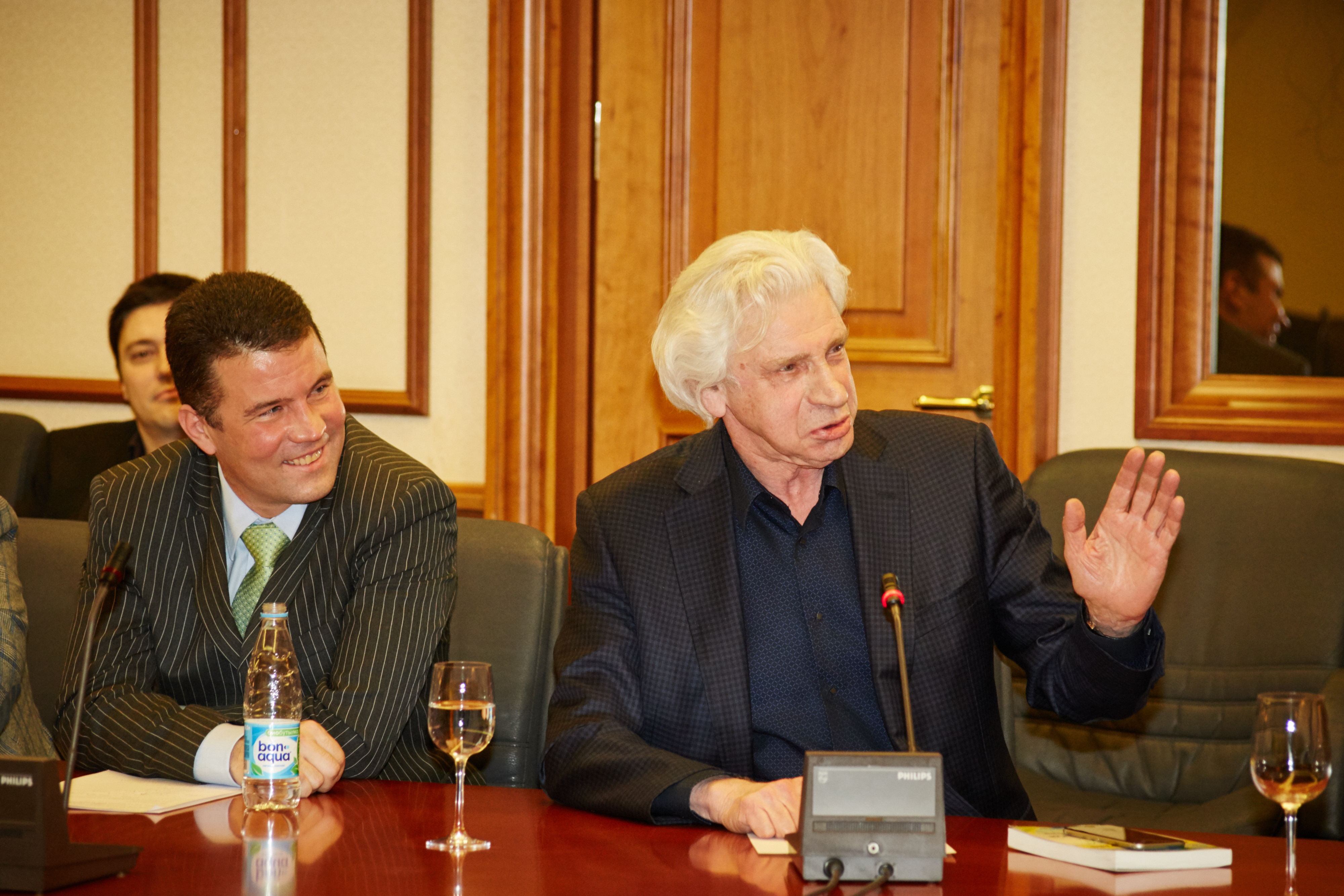 Мэтр российской адвокатуры Г.М. Резник и профессор С.В. Алексеев на заседании Московского клуба юристов и Московского английского клуба